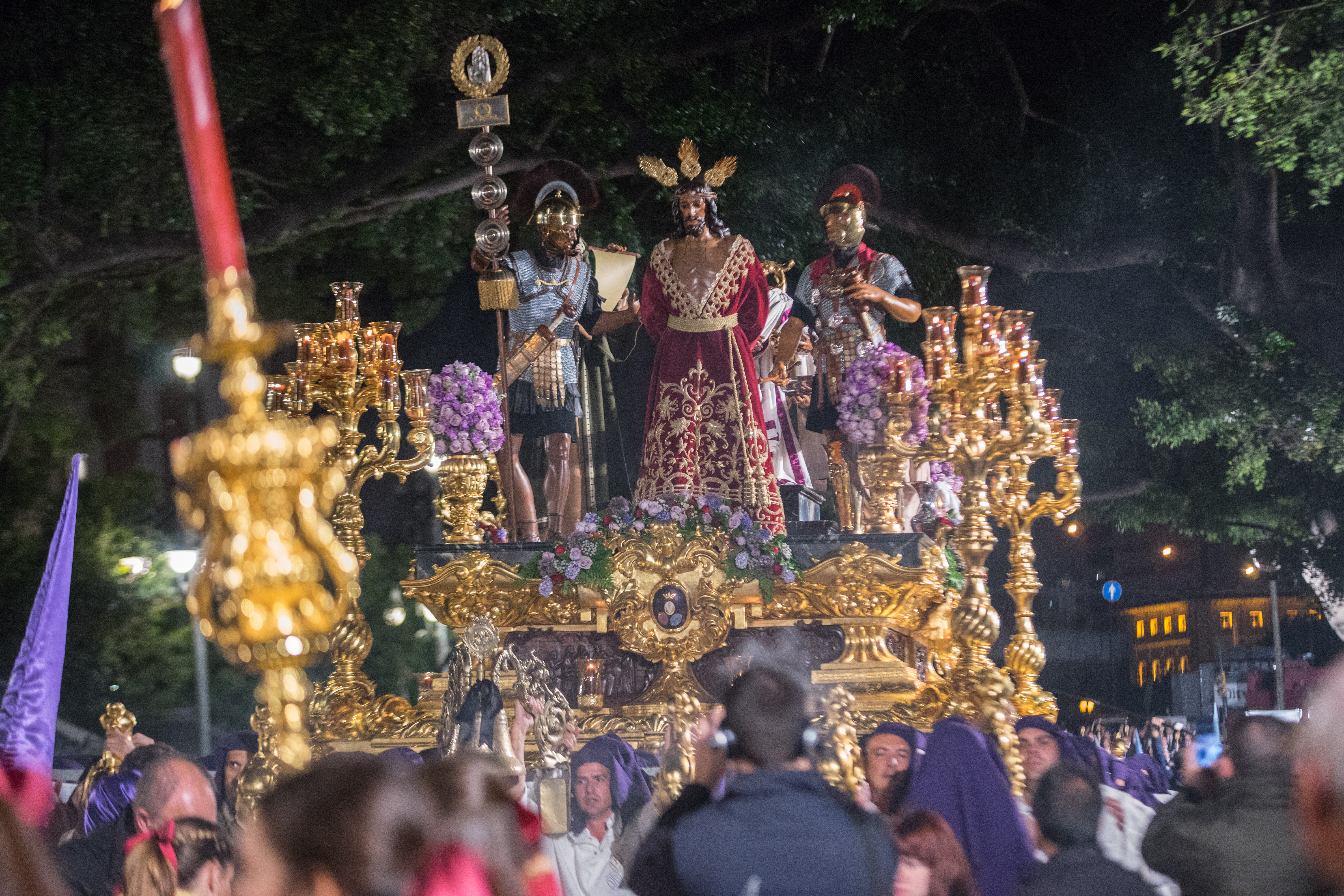 Muy Ilustre, Venerable y Fervorosa, Hermandad Sacramental y Cofradía de Nazarenos de nuestro Padre Jesús de la Sentencia, María Santísima del Rosario en sus Misterios Dolorosos y San Juan Evangelista This is a photography of a Folklore festival in Spain (Wikidata id Q9075883).